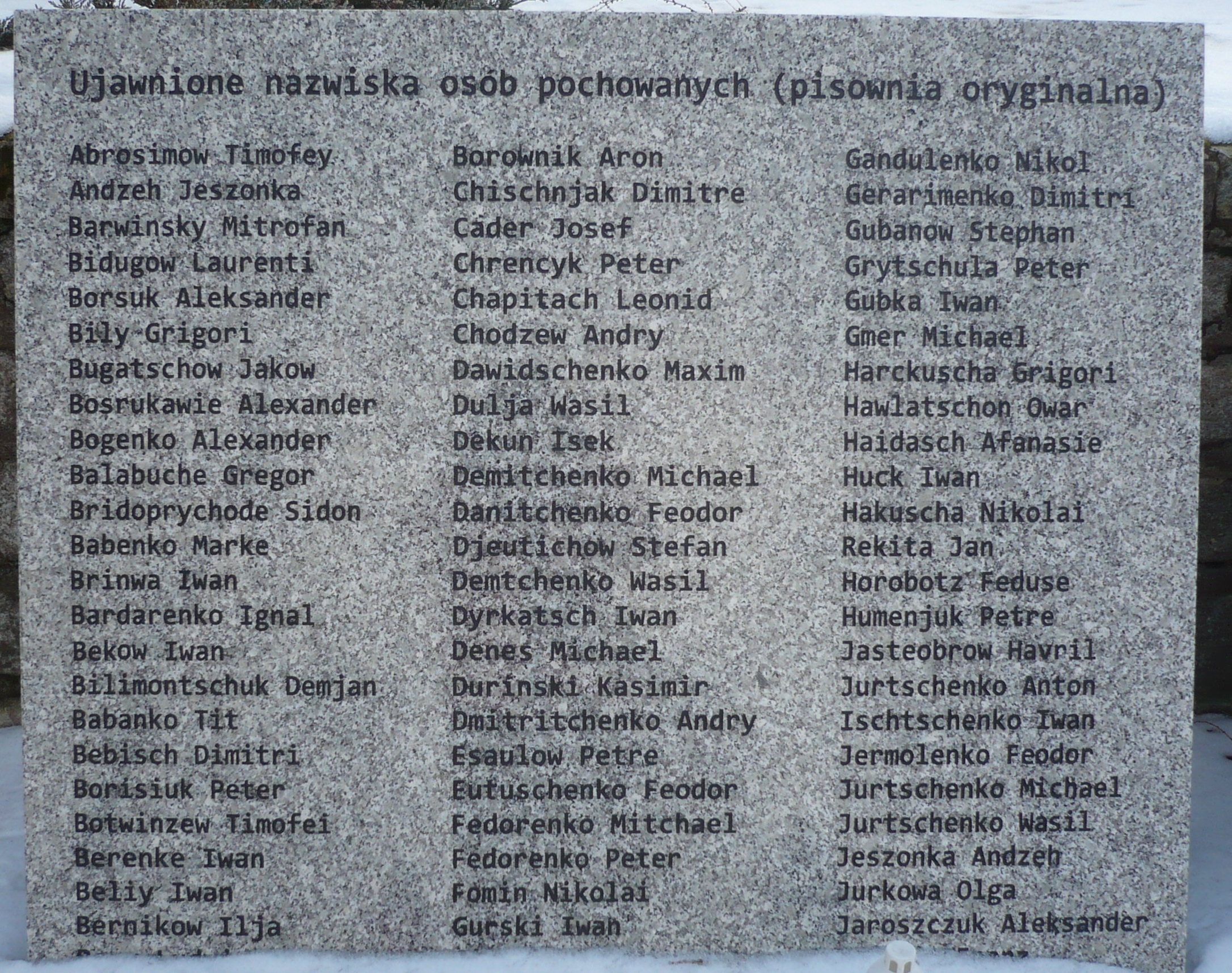 Walim. Cmentarz